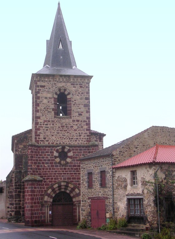 Eglise de Saint-Just près Brioude